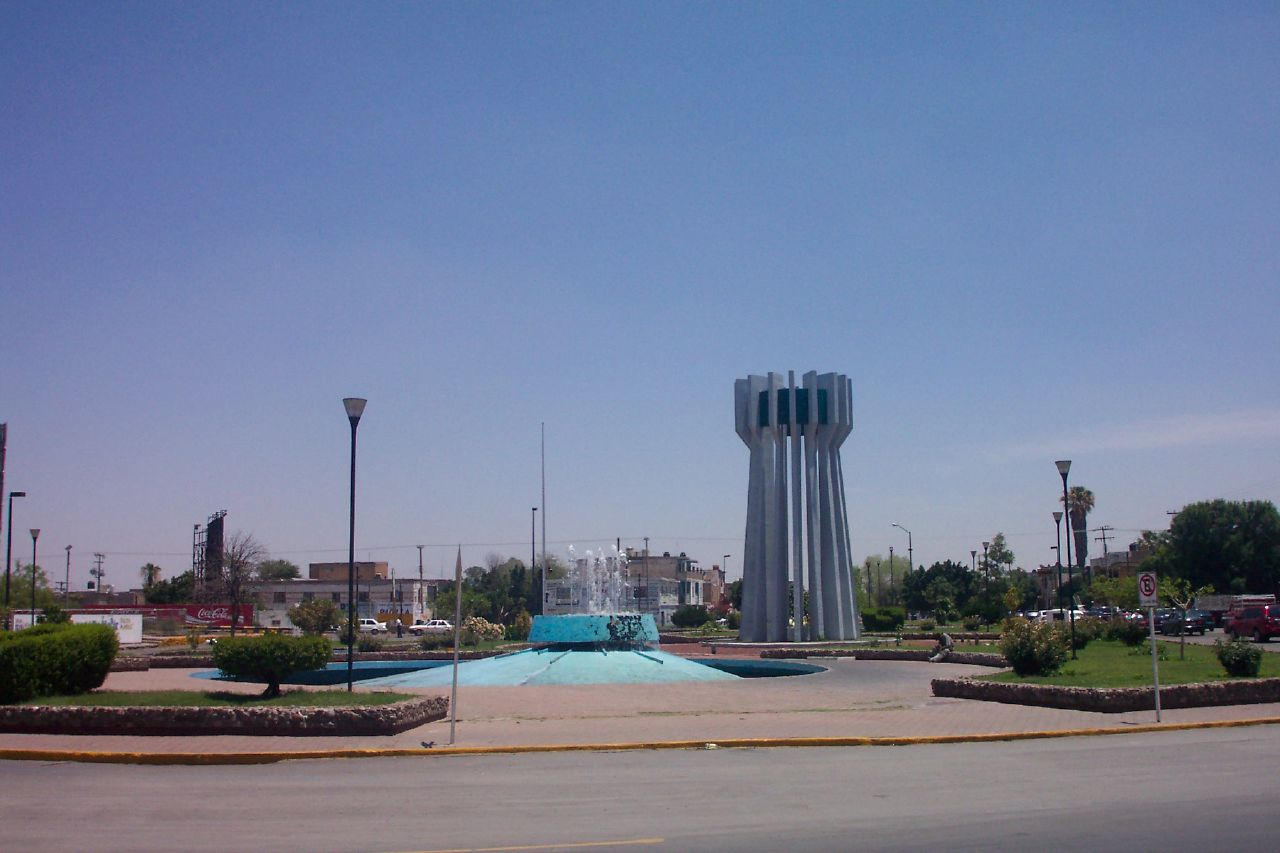 Monumento de Torreon